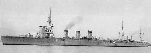 De lichte Japanse kruiser Nagara in Sasebo, Japan in de lente van 1932